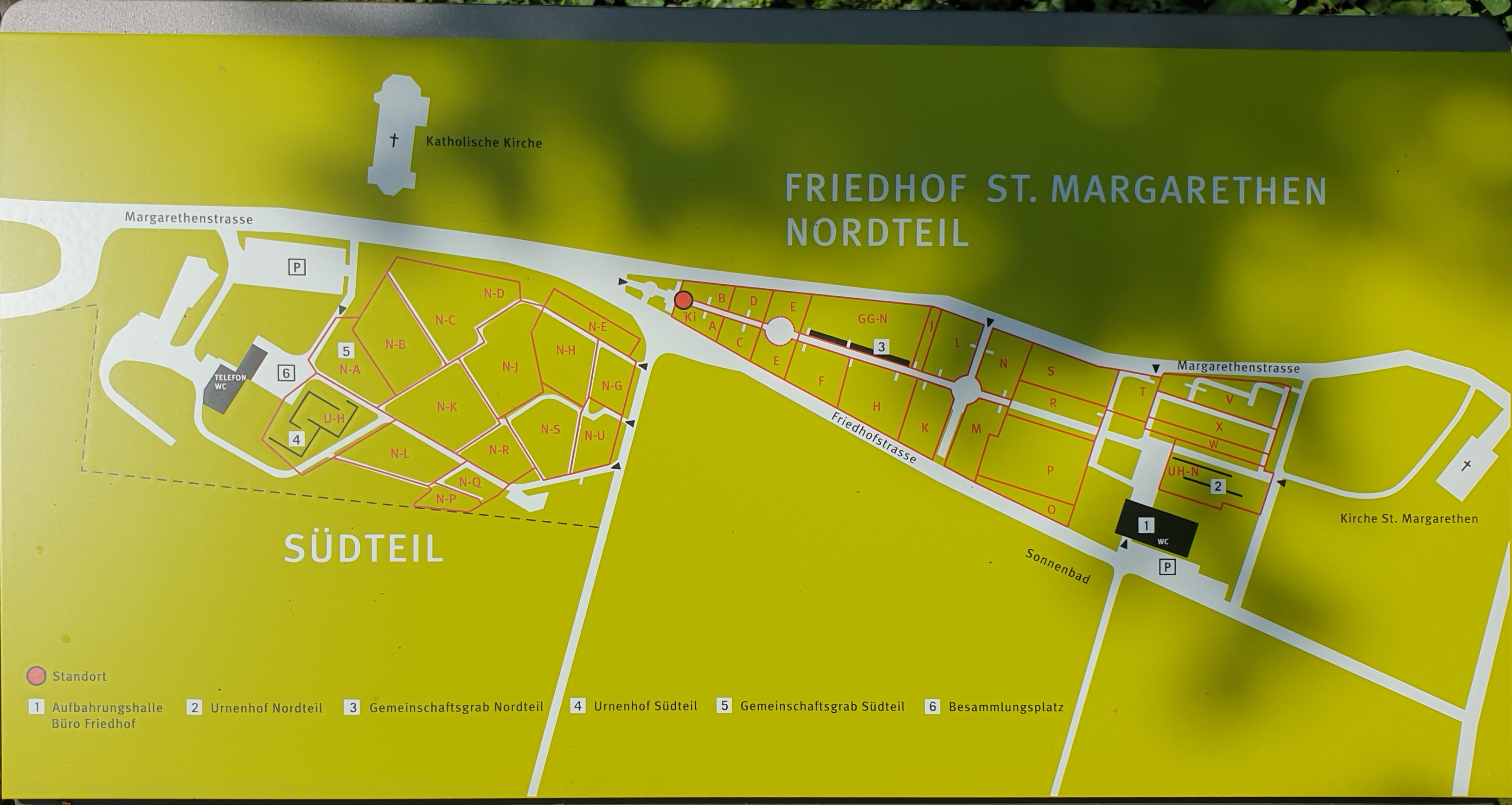 Übersichtstafel Friedhof St. Margarethen mit ihrem Nord- und Südteil